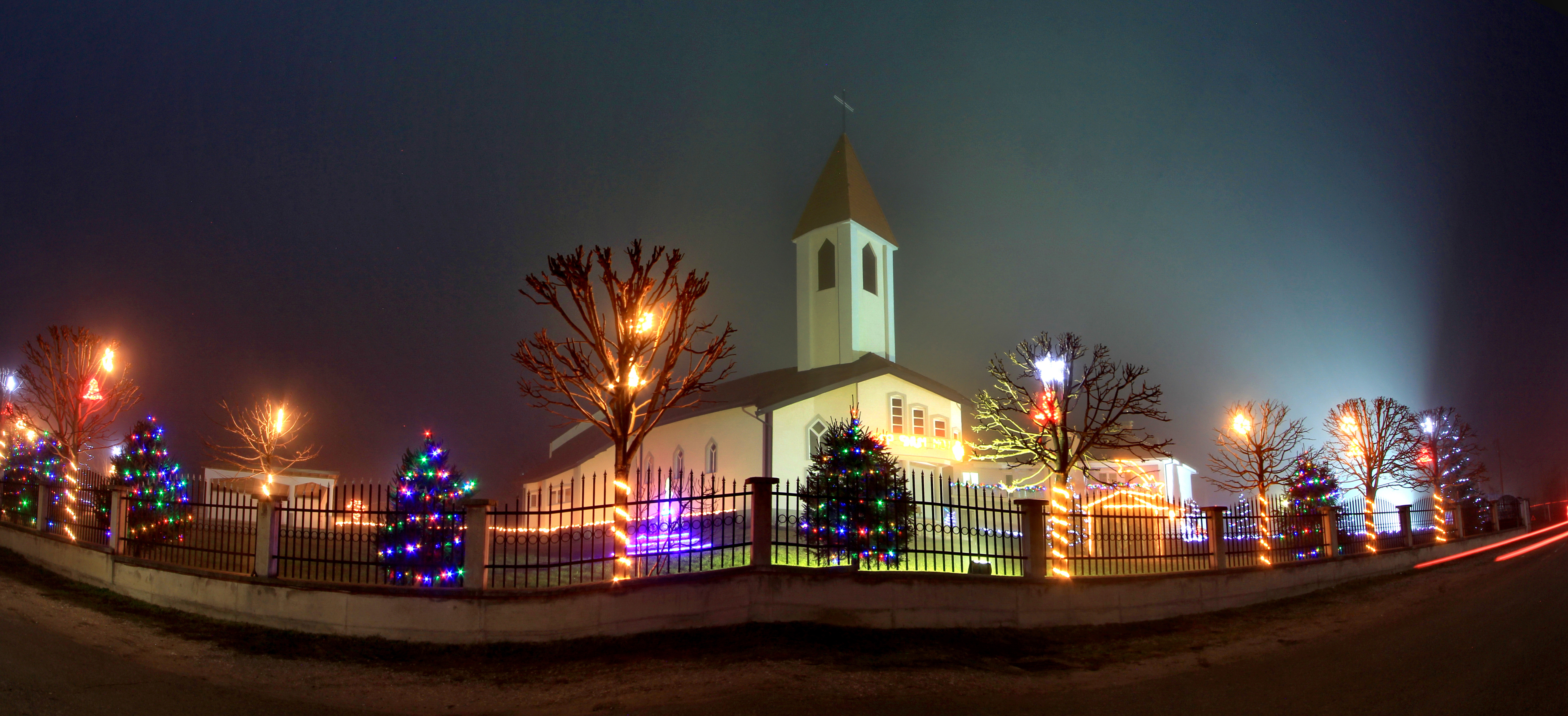 Kisha mesjetare në Pjetërshan